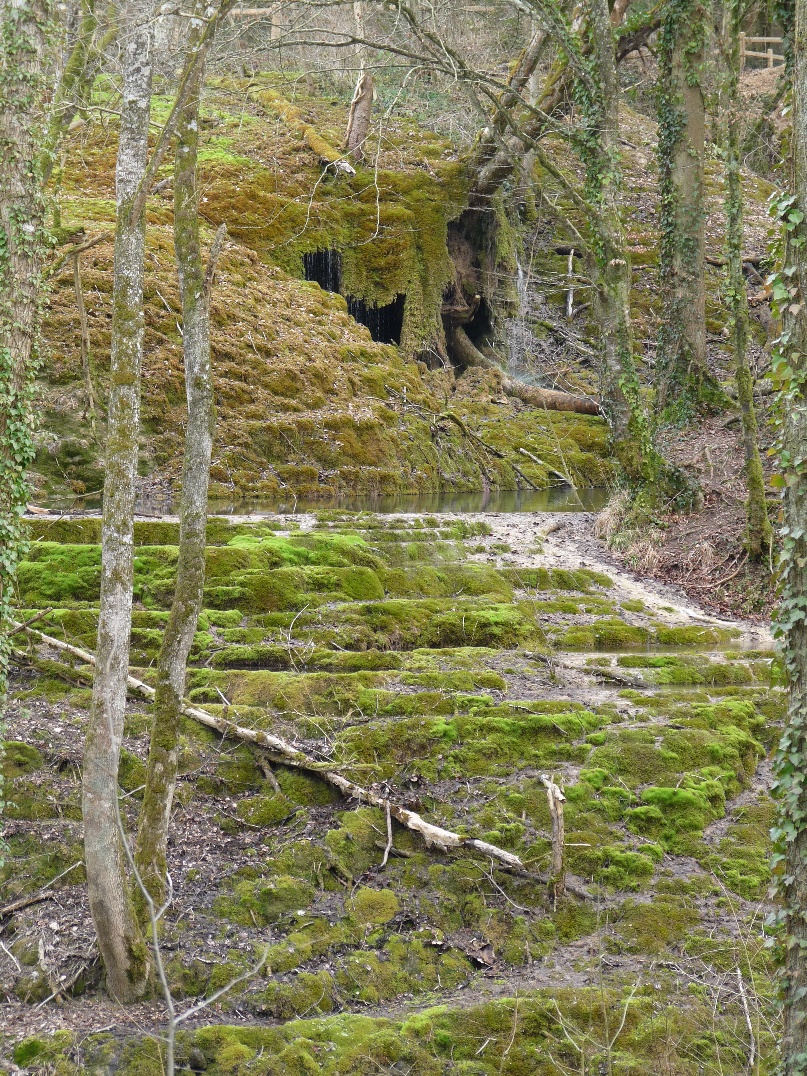 Tufière de Rolampont (Haute-Marne) : escalier naturel construit par le ruissellement de l'eau